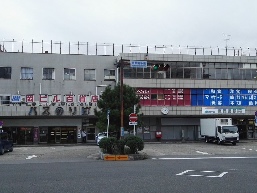 Higashi okazaki station building